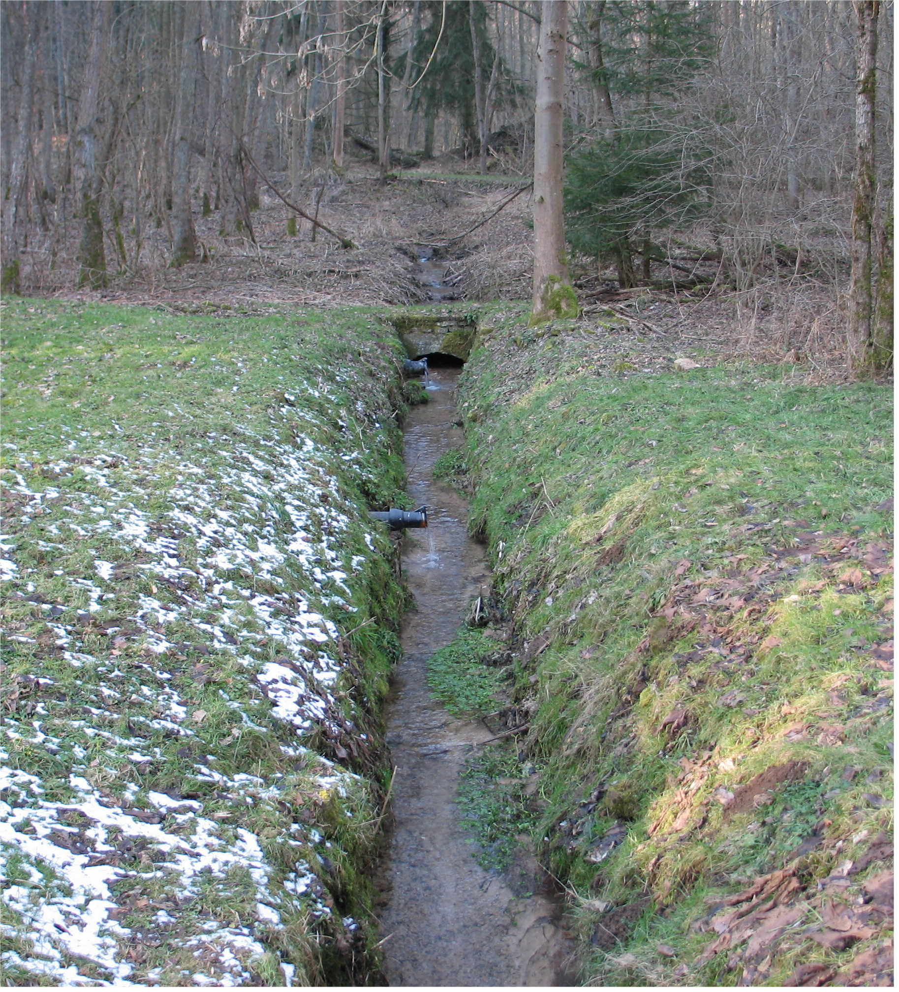 d'Birelerbaach